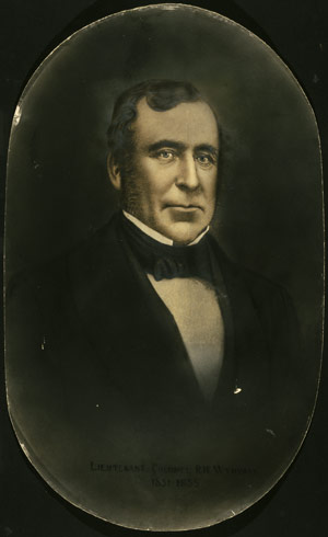 Robert Wynyard (1802-1864)